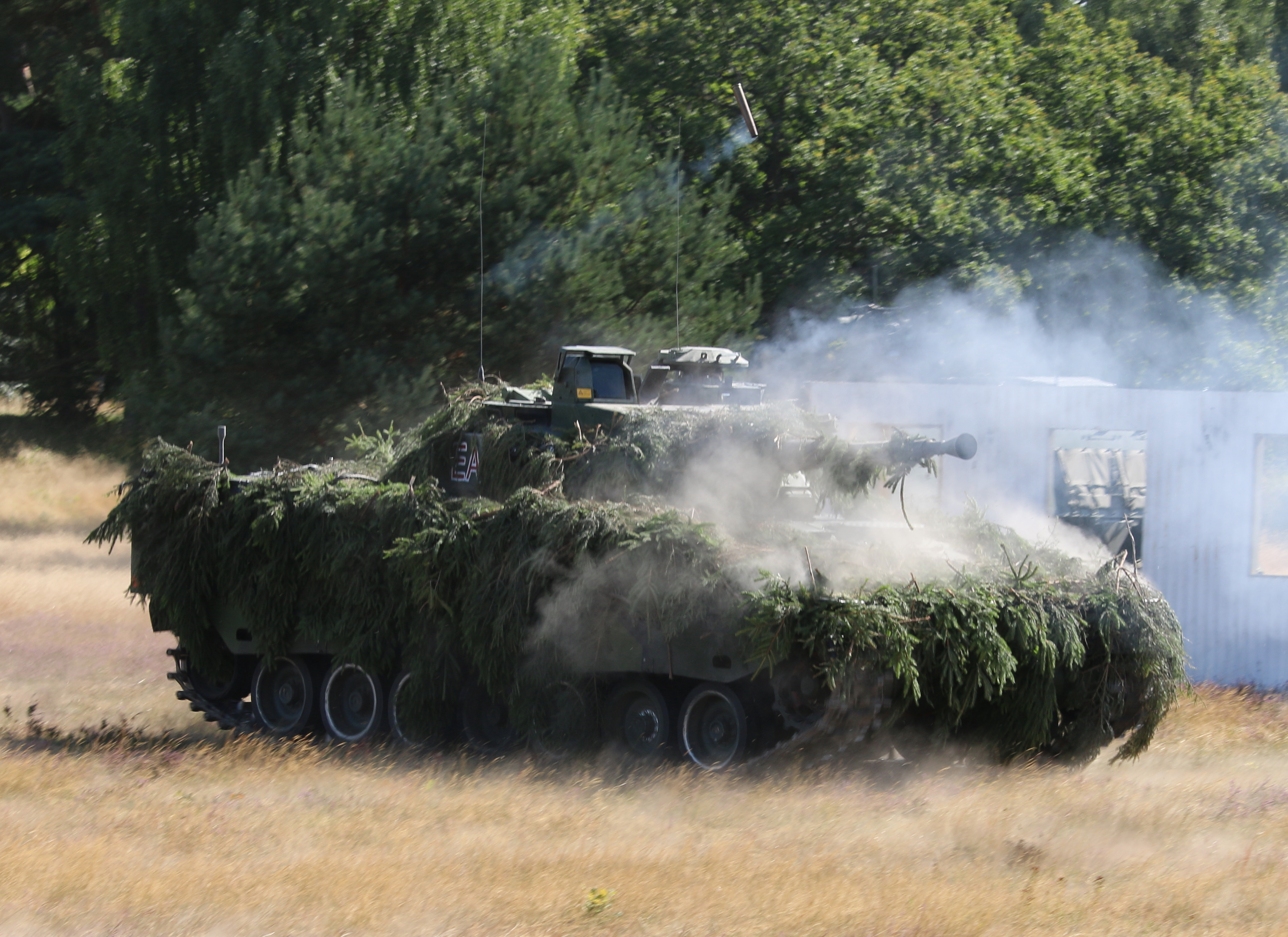 Stridsfordon 9040 Revinge 2015